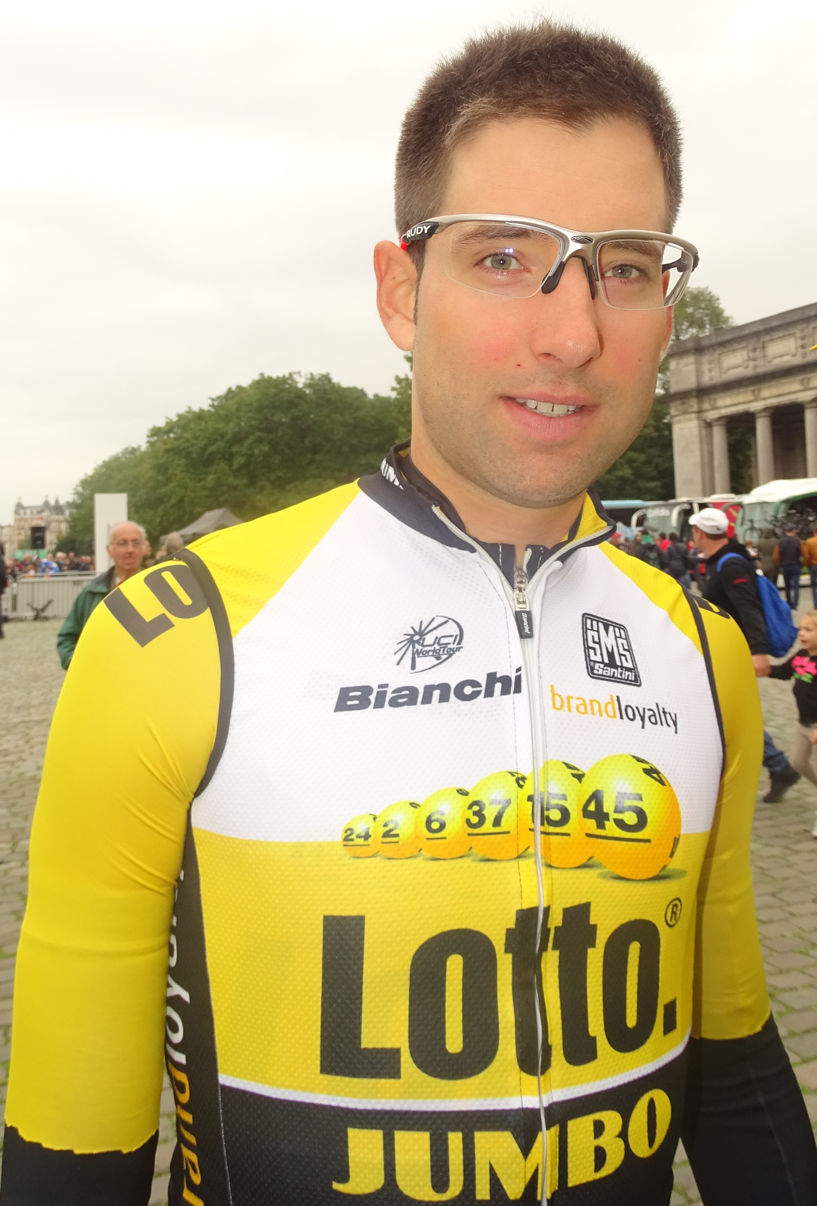 Brussels Cycling Classic 2015.